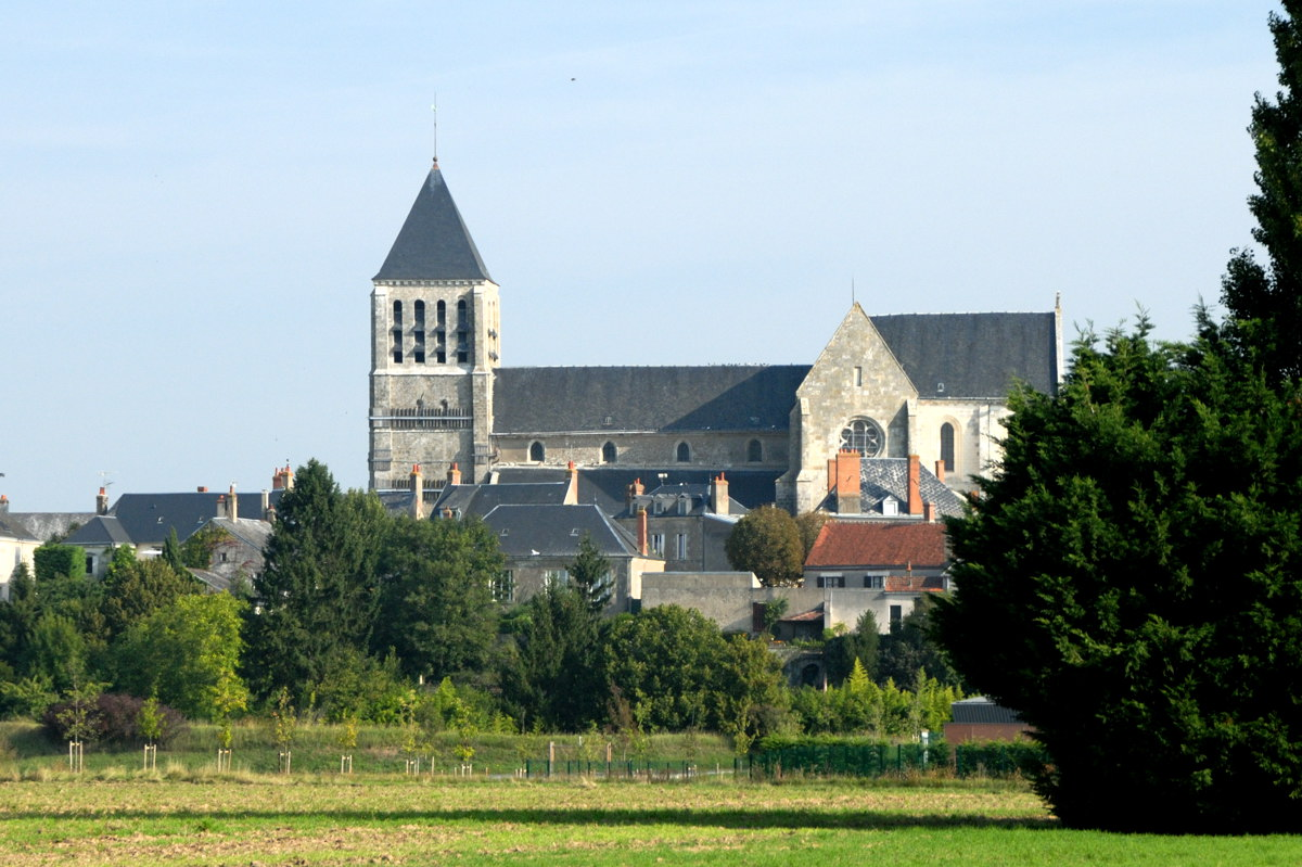 Chécy, Eglise Saint-Pierre